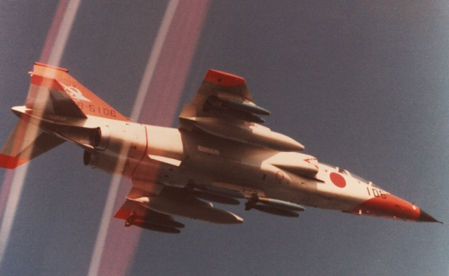 ＦＳ－Ｔ２改 支援戦闘機（ＦＳ－Ｔ２改：後のＦ－１）の実用試験 昭和５０年（１９７５年）７月～５１年（１９７６年）３月